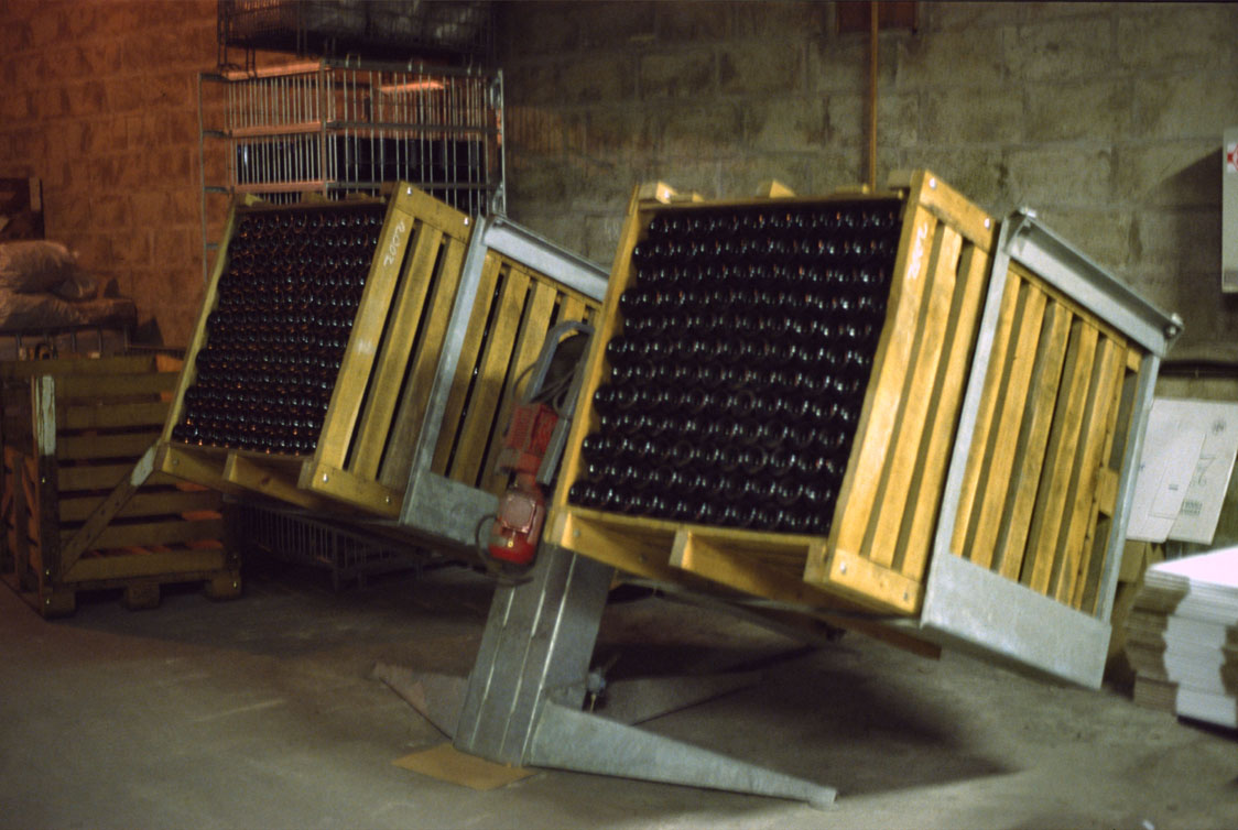 Gyropaletten in einer Champagnerkellerei.